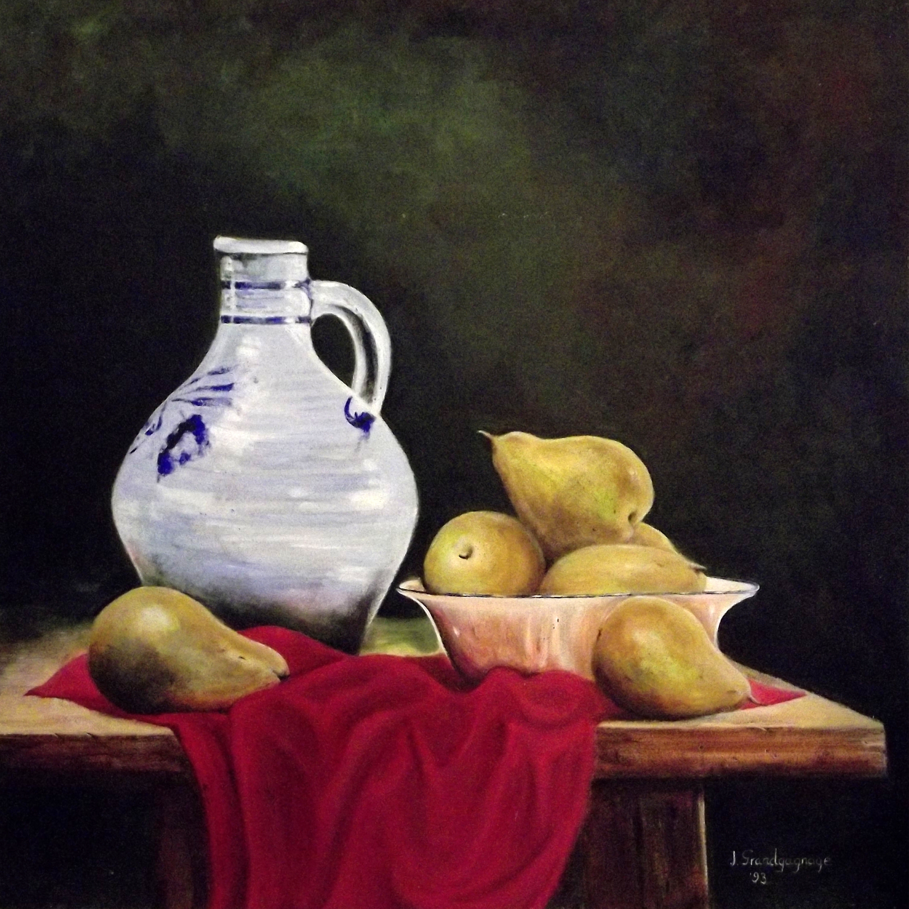 Stilleven met peren en kruik, olieverf op hout by Julien Grandgagnage, 60x60